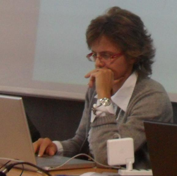 Elena Cattaneo è fra i relatori del primo incontro del ciclo di conferenze "Voglia di evoluzione": Cellule staminali (20 ottobre 2010).